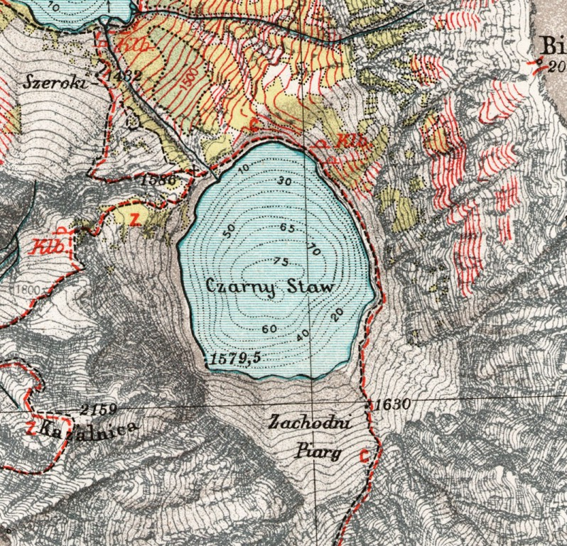 Czarny Staw. Fragment mapy "Tatry (część polska). Mapa fotogrametryczna" w skali 1:20.000 z 1938 r.